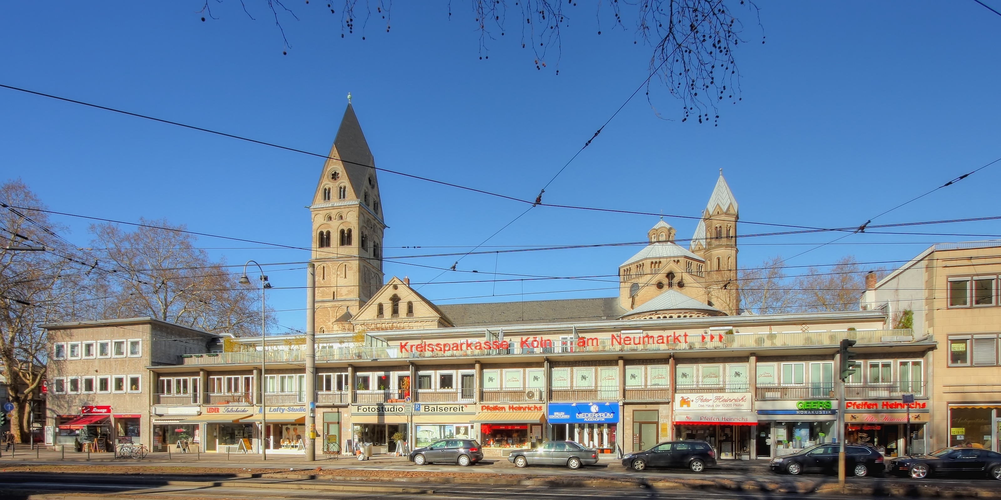 Denkmalgeschützte Wohn- und Geschäftshäuser. Architekten: Stephan und Johannes (Jan) Werner Starck (1951/52 höherer Osttrakt 1956). Links außen: Apostelnkloster 2. im Hintergrund St. Aposteln.